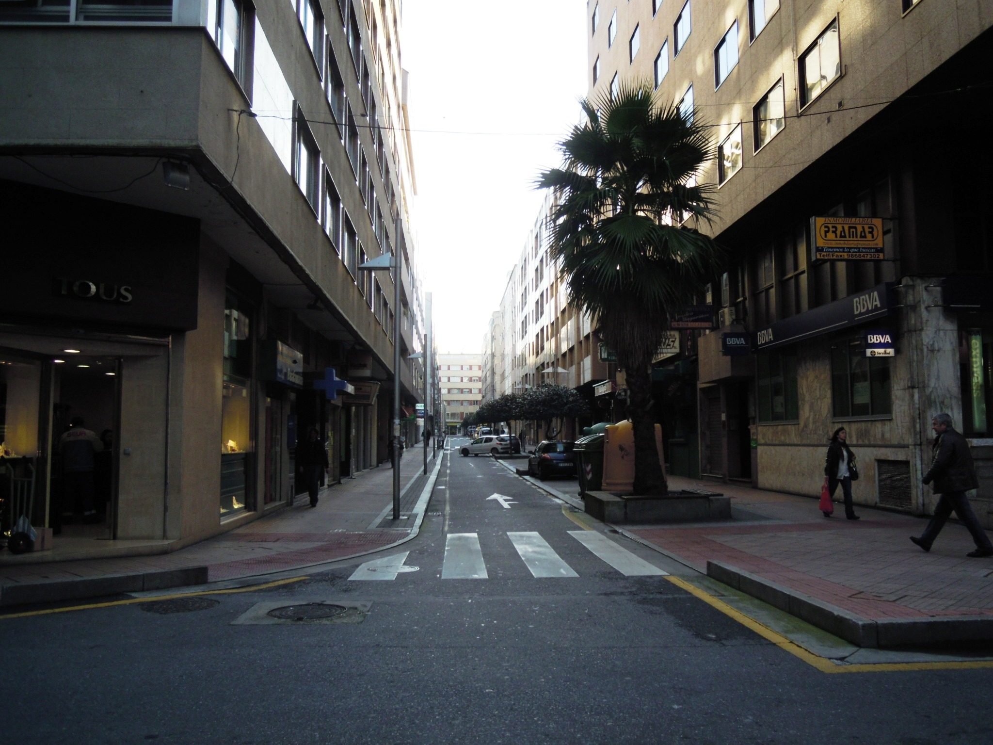 Rúa de Cruz Gallástegui de Pontevedra; cruzamento coa rúa de Sagasta.